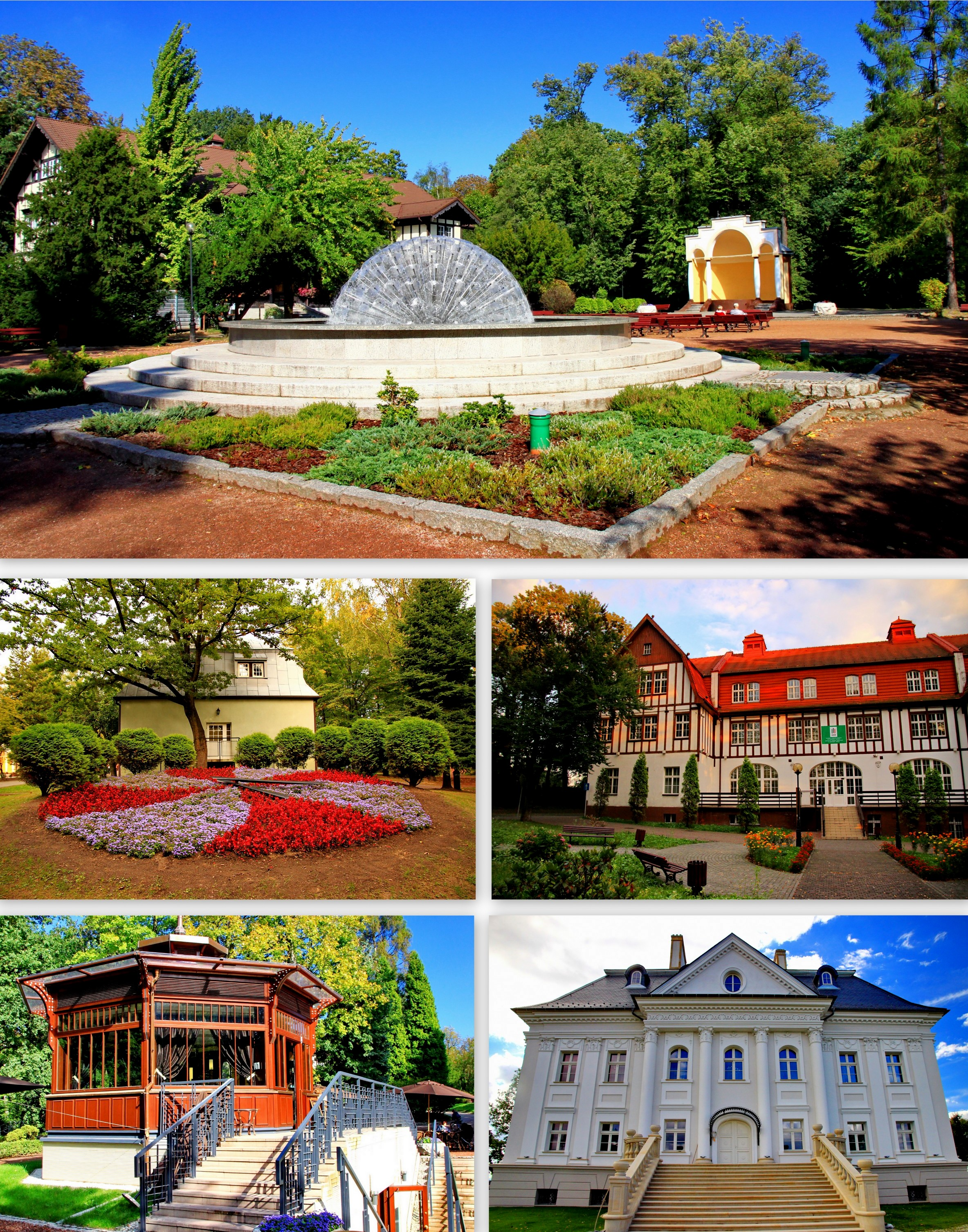 Kolaż zdjęć z Jastrzębia-Zdroju, na podstawie prac użytkownika Halavar.